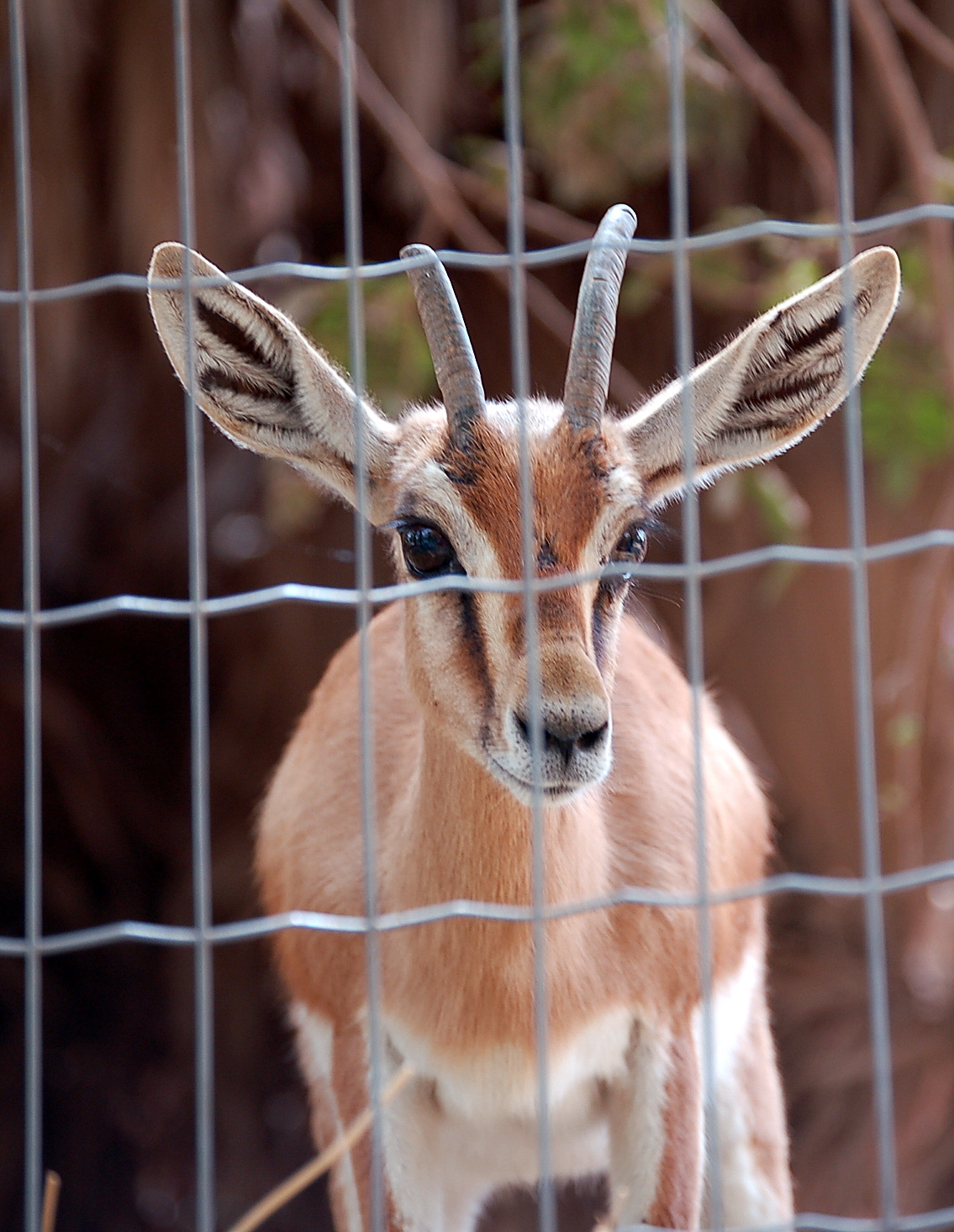 Gazelle in Agadir's municipal ZOO (Morocco)